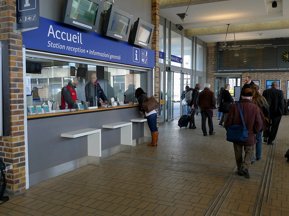 Accueil de la gare de Partis-Bercy